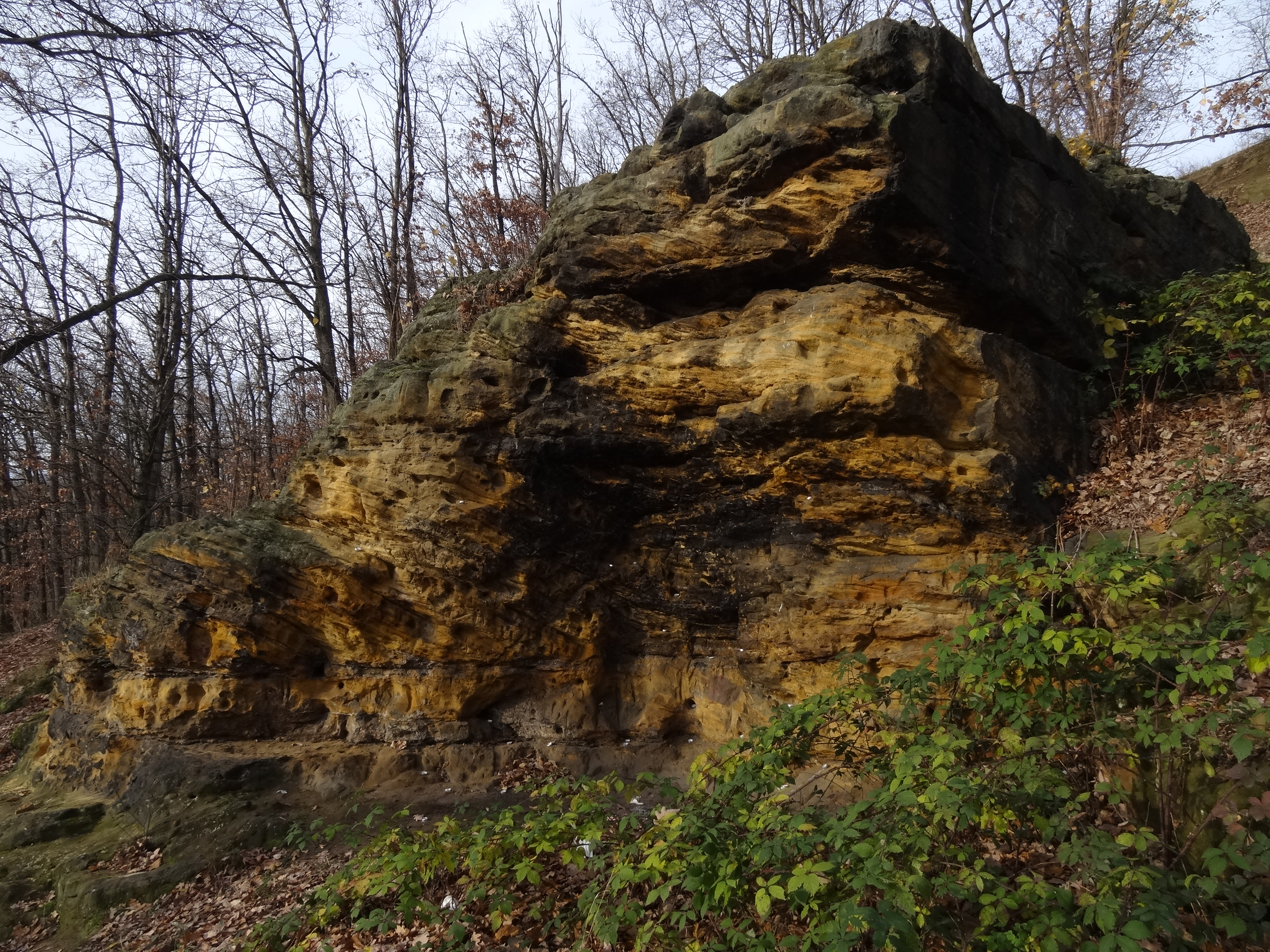 PP Okrouhlík - pískovcový skalní výchoz